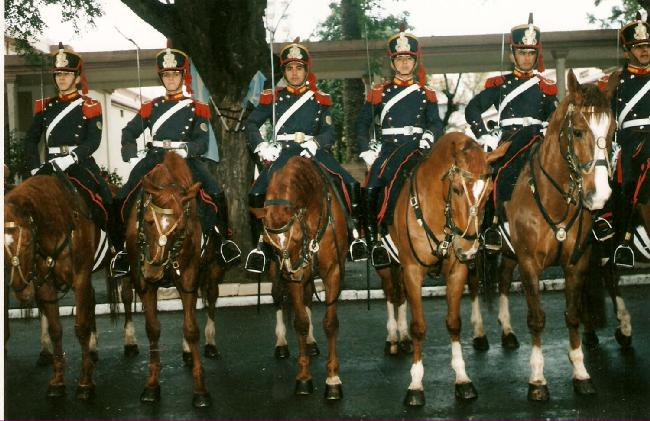 Fotografia tomada en una Ceremonia en el Regimiento de Granaderos a Caballo el 17 de Agosto de 2004